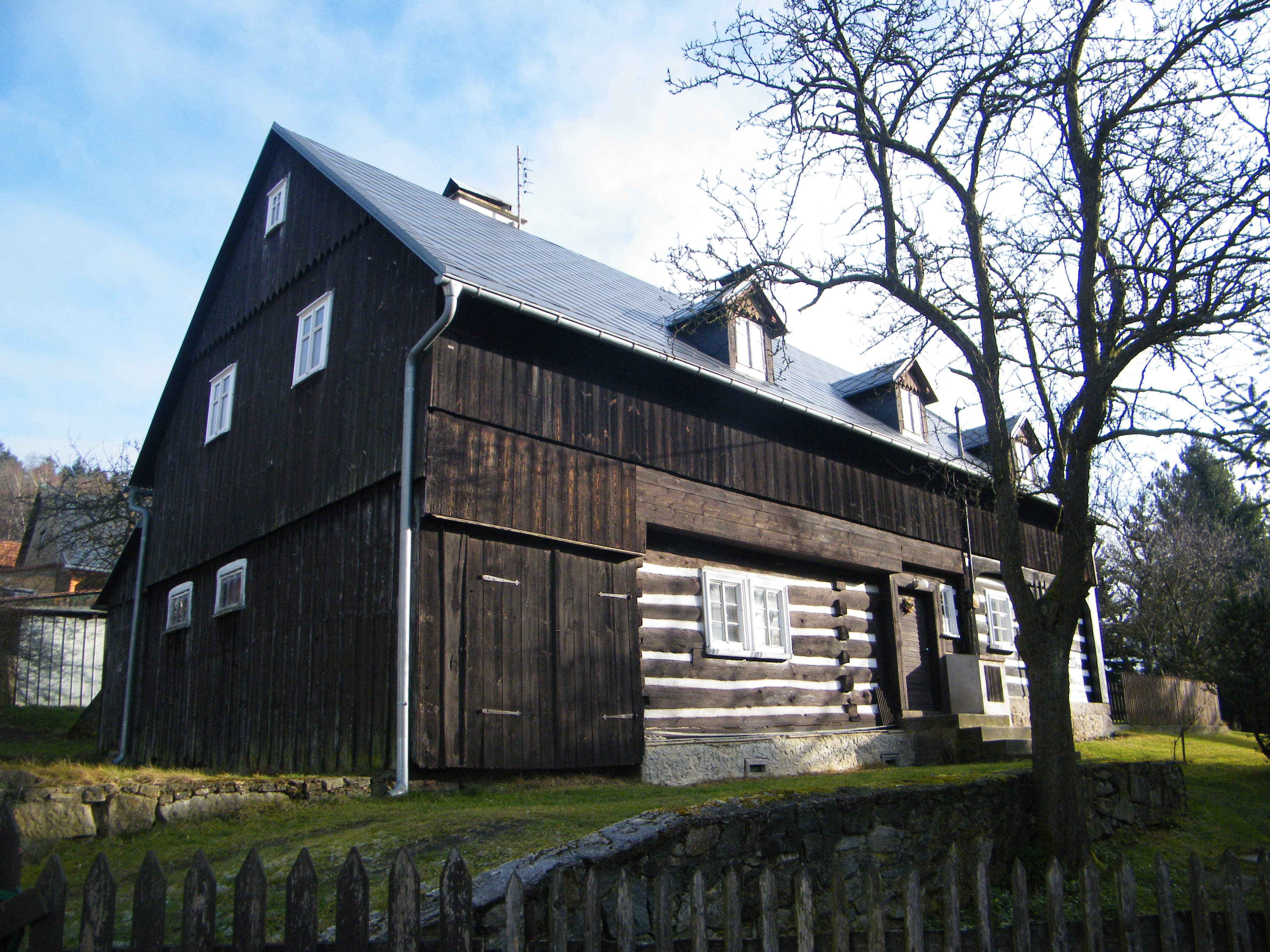 Chalupa čp. 449 v Mikulášovicích